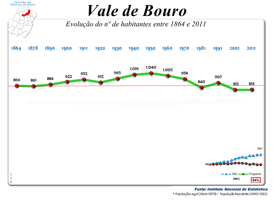 Censos 1864/2011